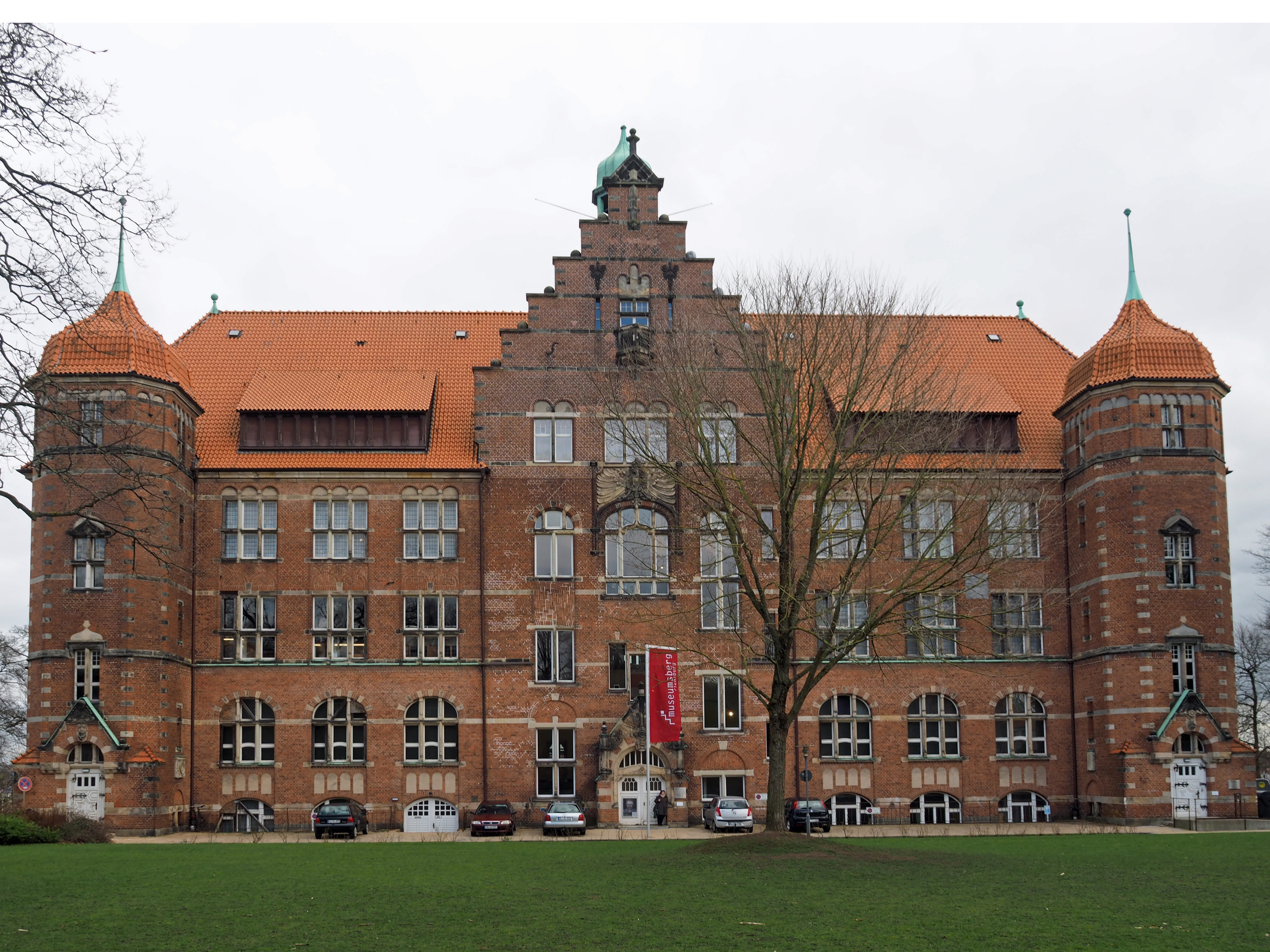 Museumsberg Flensburg - Heinrich-Sauermann-Haus